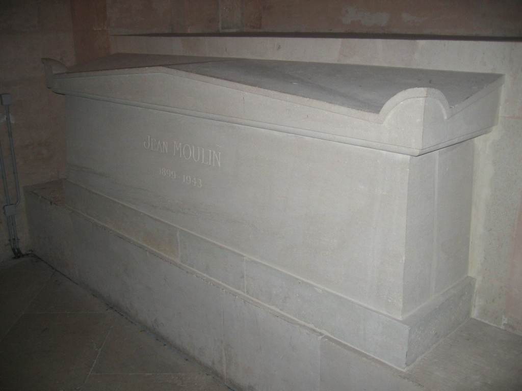 Sépulpture de Jean Moulin au Panthéon